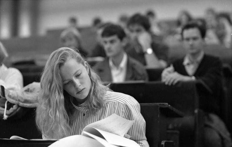 Juni 1988 Heidelberg - Universität Vorlesung